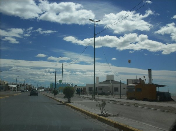 primera fila playa union